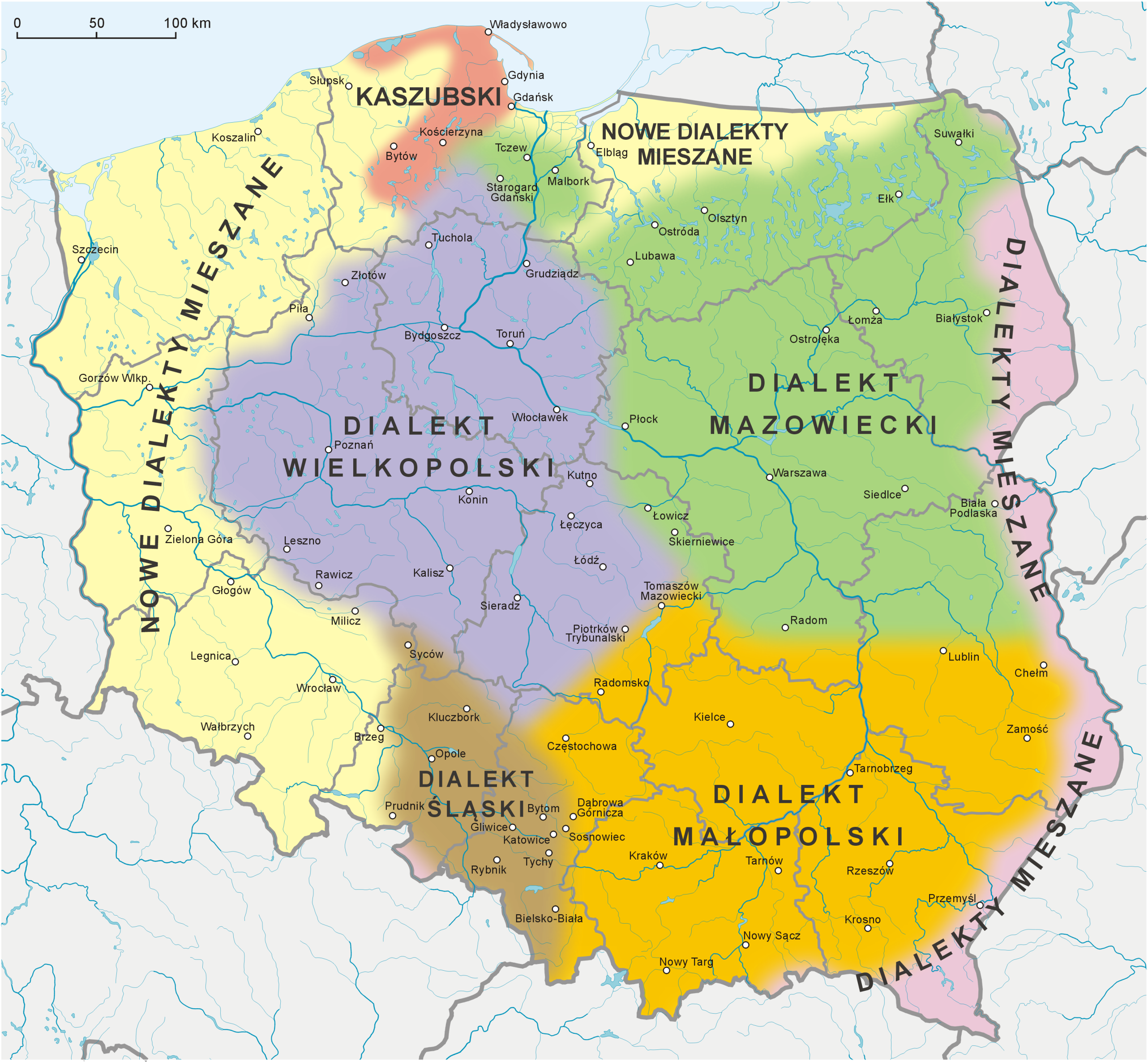 Zasięgi dialektów polskich na podstawie Karol Dejna, Dialekty polskie, Wrocław-Warszawa-Kraków-Gdańsk, 1973.